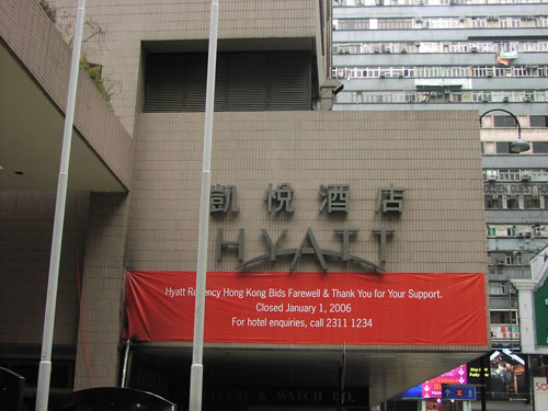 中文（香港）: 香港凱悅酒店